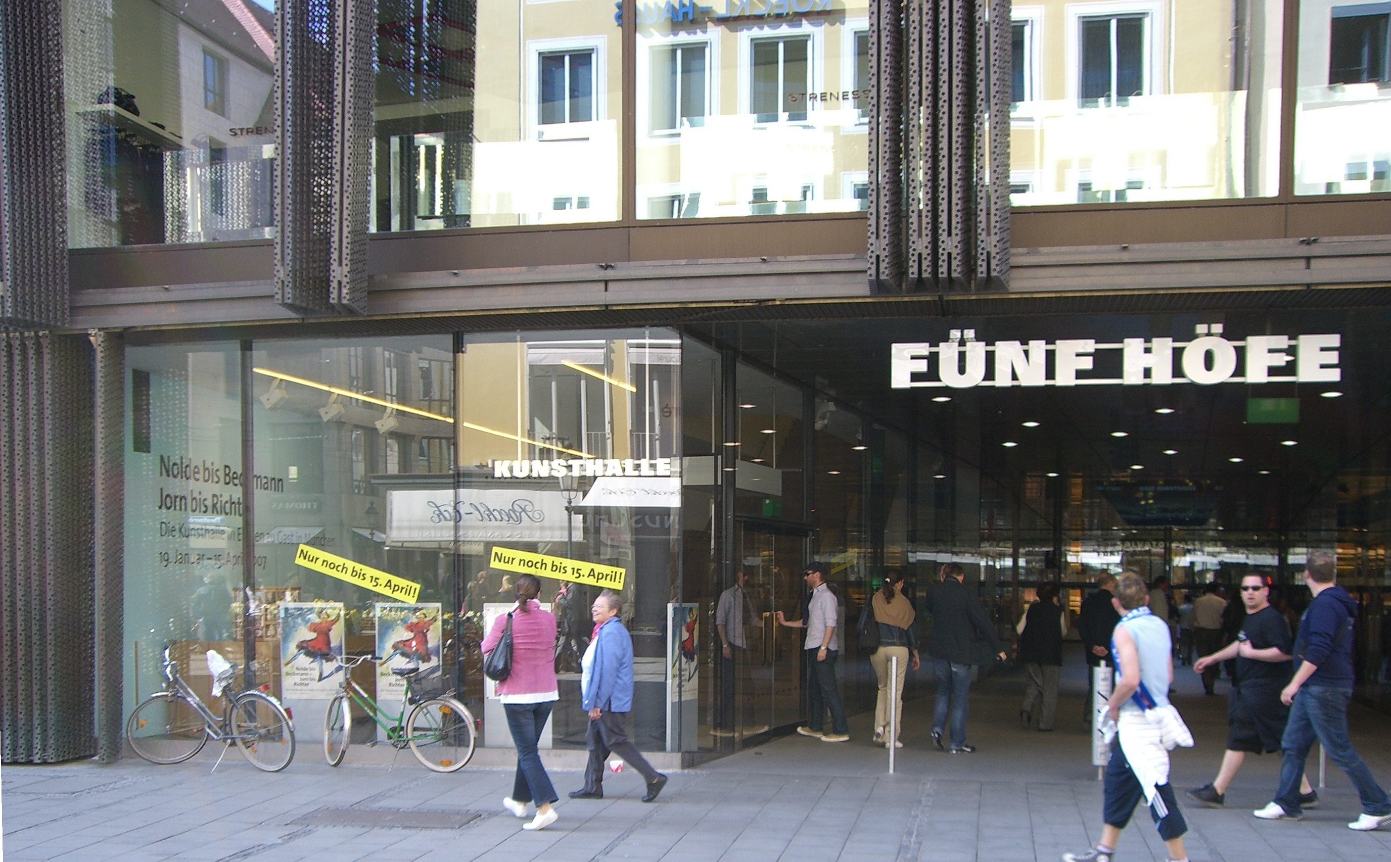 München - Die Kunsthalle München direkt im Eingang zu den Fünf Höfen von der Theatinerstraße